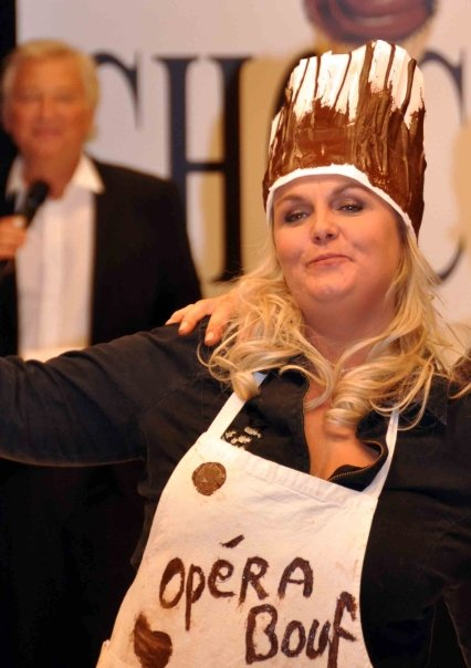 Valérie Damidot au salon du chocolat ; visible au second plan, mais flou : Laurent Boyer